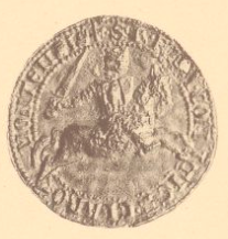 Robert VII. z Auvergne